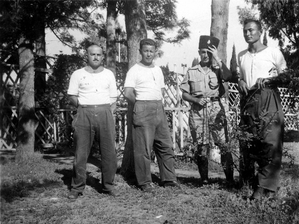 אסירי ההגנה בהם משה דיין (מימין), משה כרמל (שני משמאל) ויעקב (יענקלה) סלומון (משמאל). בכלא עכו 1939 - /דיין